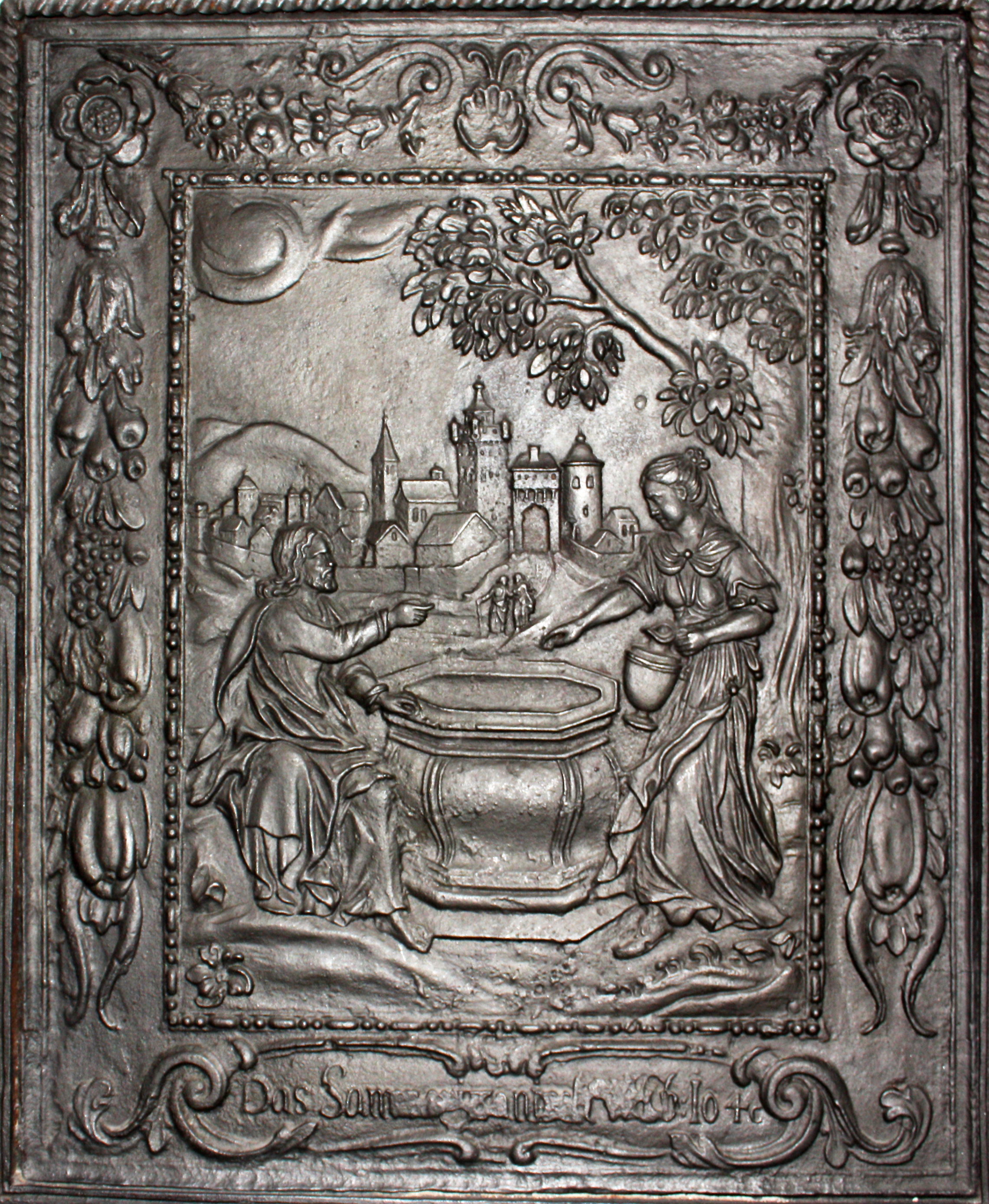 Kölner Kartause, Hardenrath Kapelle. Gusseiserne Ofenplatte in der Kaminwand zur Kartäuserkirche. Sie war Teil eines barocken „Bibelofens“ aus der Zeit um 1625. Ihr Relief zeigt Christus und die Samariterin am Brunnen (Joh 4,5-26), und ist Anspielung auf die Taufe.